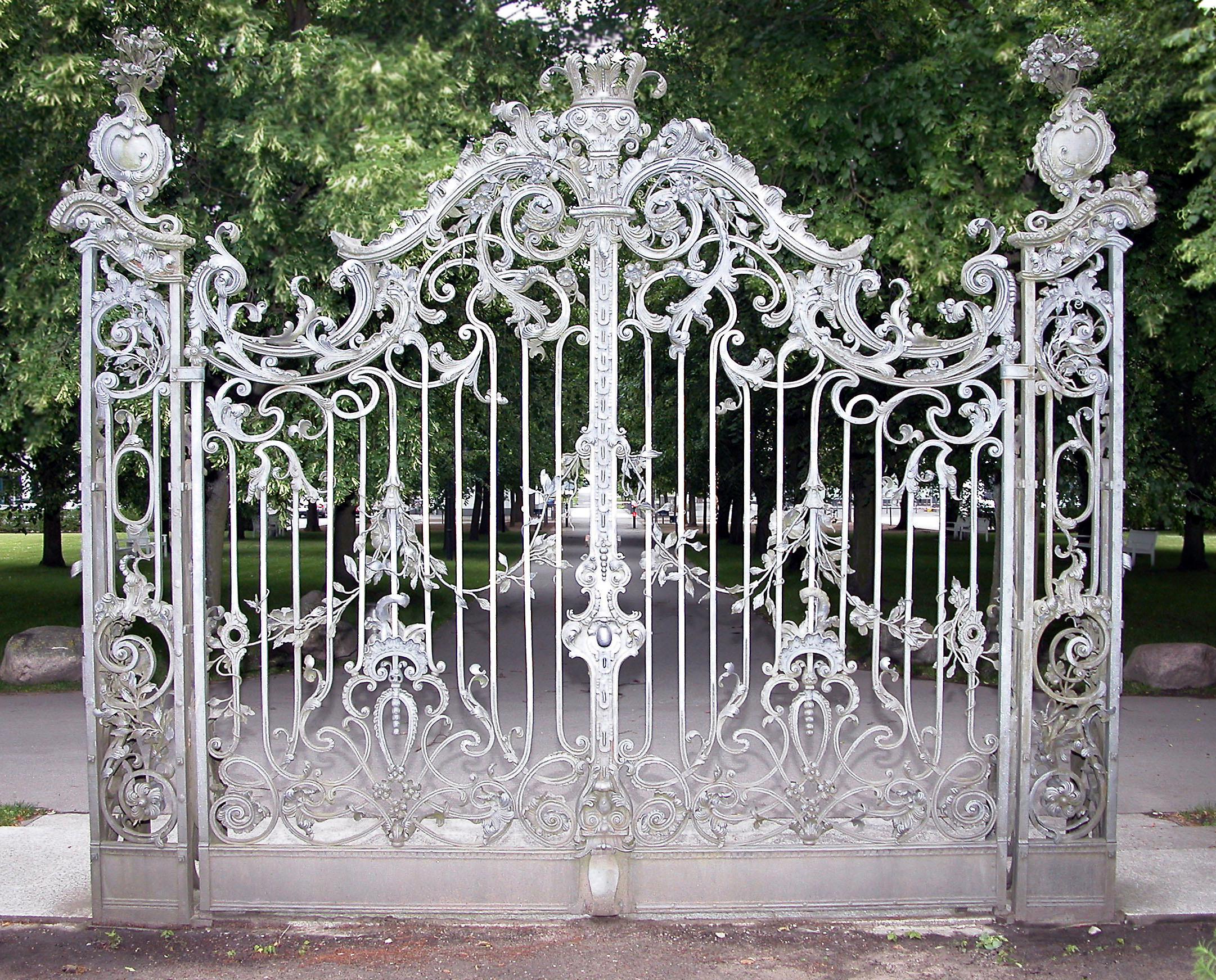 25.06.2004 17495 Karlsburg, Nepziner Weg / Greisfswalder Straße (GMP: 53.970552,13.610214): Barockschloß (1732). Bis 1945 im Besitz der Adelsfamilie von Bismarck-Bohlen und anschließend in der DDR bis 1990 Teil des in Karlsburg ansässigen Zentralinstitutes für Diabetes. Seitdem gehört es dem Land Mecklenburg-Vorpommern und wird durch die Universität Greifswald verwaltet. Hier befinden sich Institute und ein privates Klinikum. Das schmiedeeisernes Rosentor zum Schloßareal entstand1896 nach einer Zeichnung von Helene von Thiele-Winckler, der Gattin des Schloßherrn Friedrich Karl Graf von Bismarck- Bohlen. [DSCN4157.JPG]20040625170DR.JPG(c)Blobelt